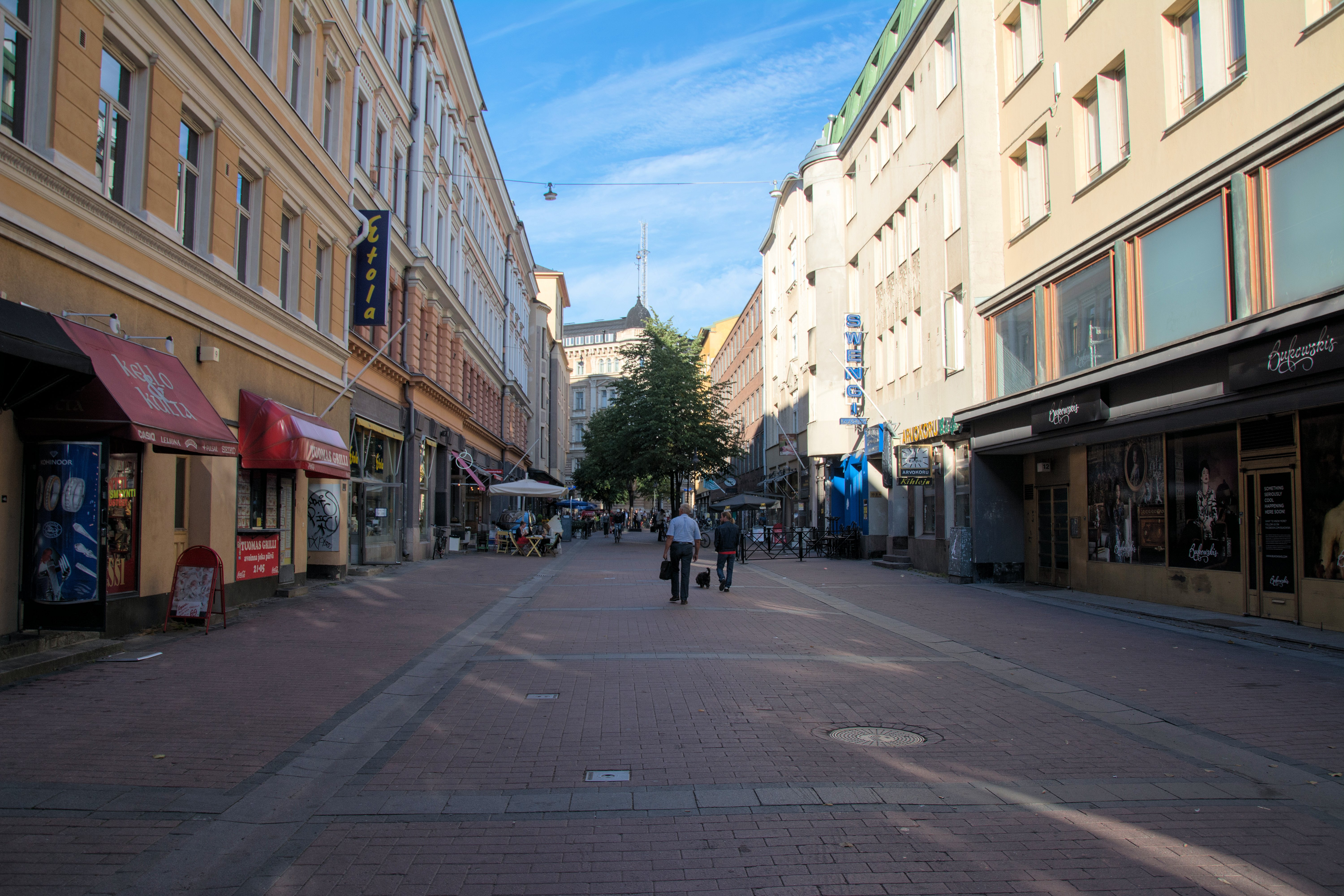 Iso Roobertinkatu Helsingissä